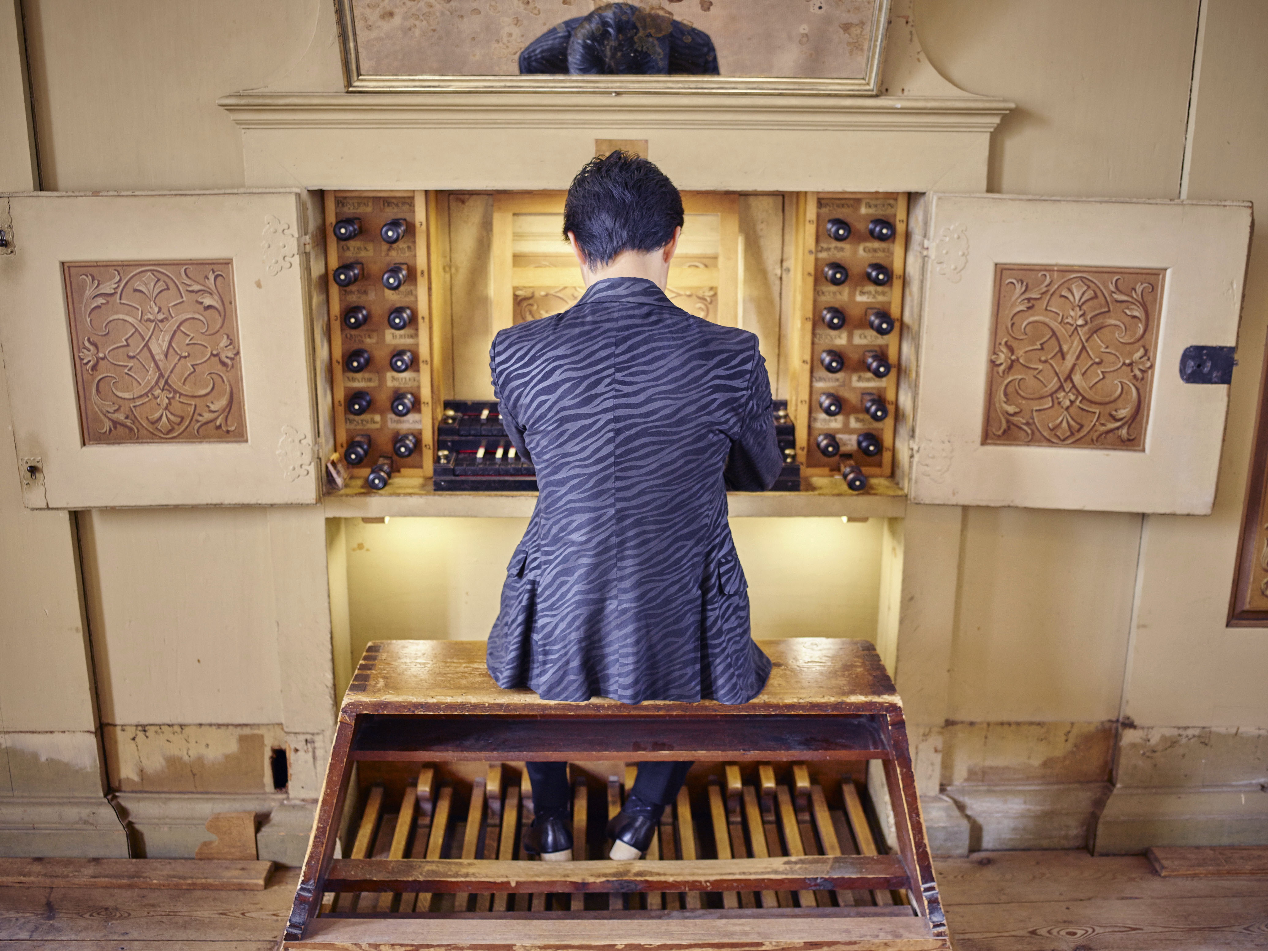 한국어 (조선): 뢰타 게오르겐교회 질버만오르간 1721년 제작